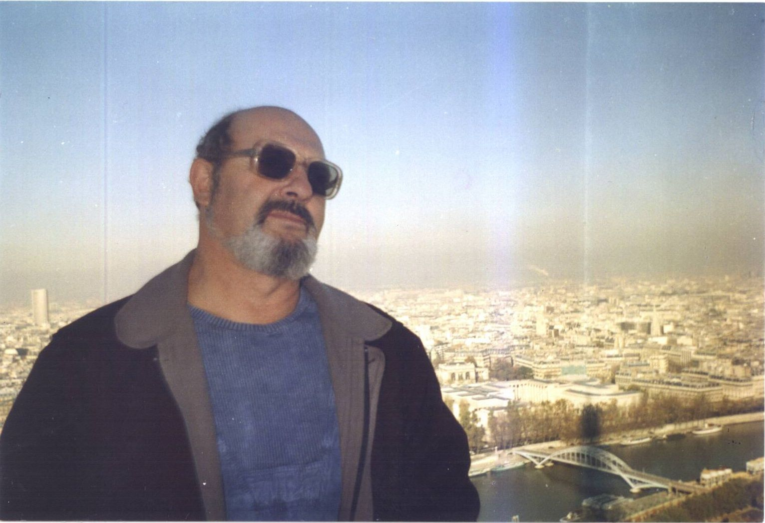 Valerij Nikolaevskij auf dem Eiffelturm in Paris